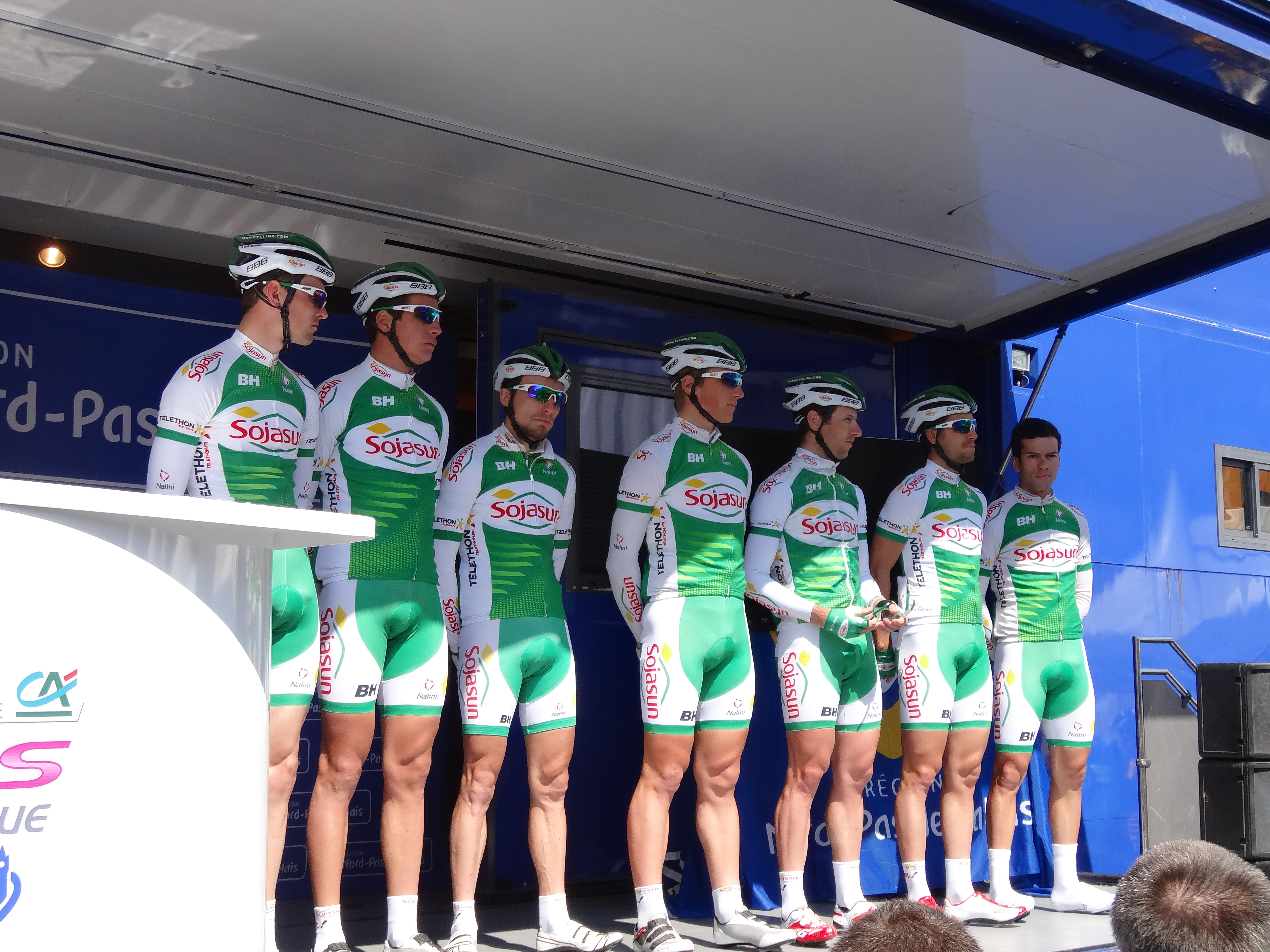 Reportage photographique réalisé le mercredi 1er mai 2013 au départ de la première étape de l'édition 2013 des Quatre jours de Dunkerque à Dunkerque, Nord, Nord-Pas-de-Calais, France. Le dossier photographique montre des véhicules de course exposés, la caravane publicitaire, la présentation des coureurs, et le départ. Depicted people: ...., ...., Jean-Marc Marino, Evaldas Šiškevičius, ...., .... and Julien El Fares